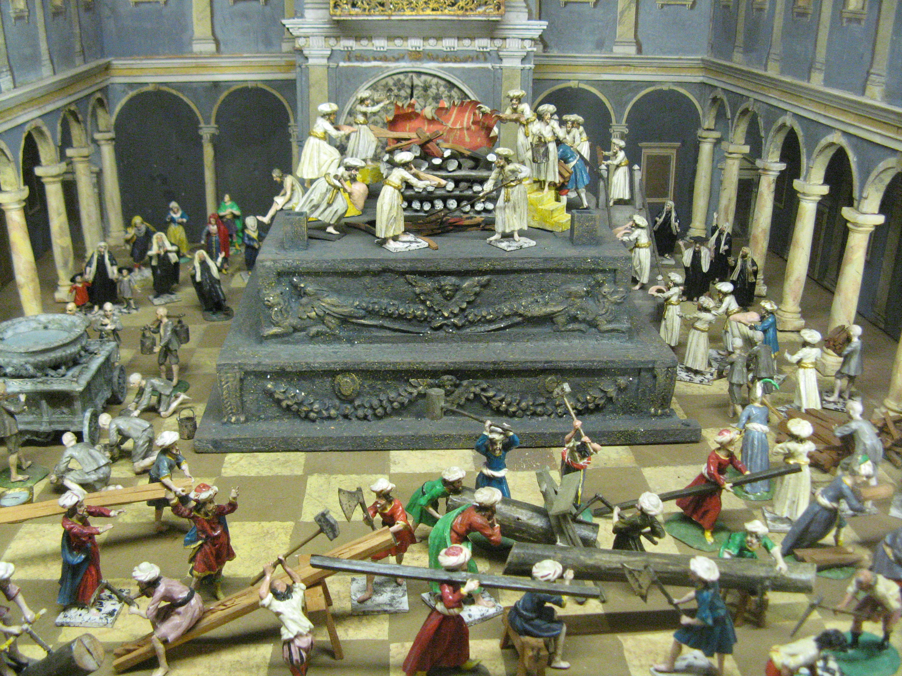 Augustin Alois Probst: Brandopfer im Vorhof des Tempels, Krippenmuseum Brixen